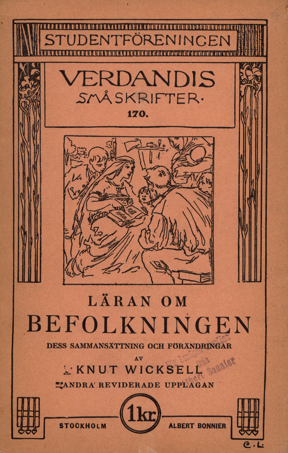 Cover of Verdandis småskrifter